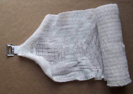 Bandaż. Autor: Reytan